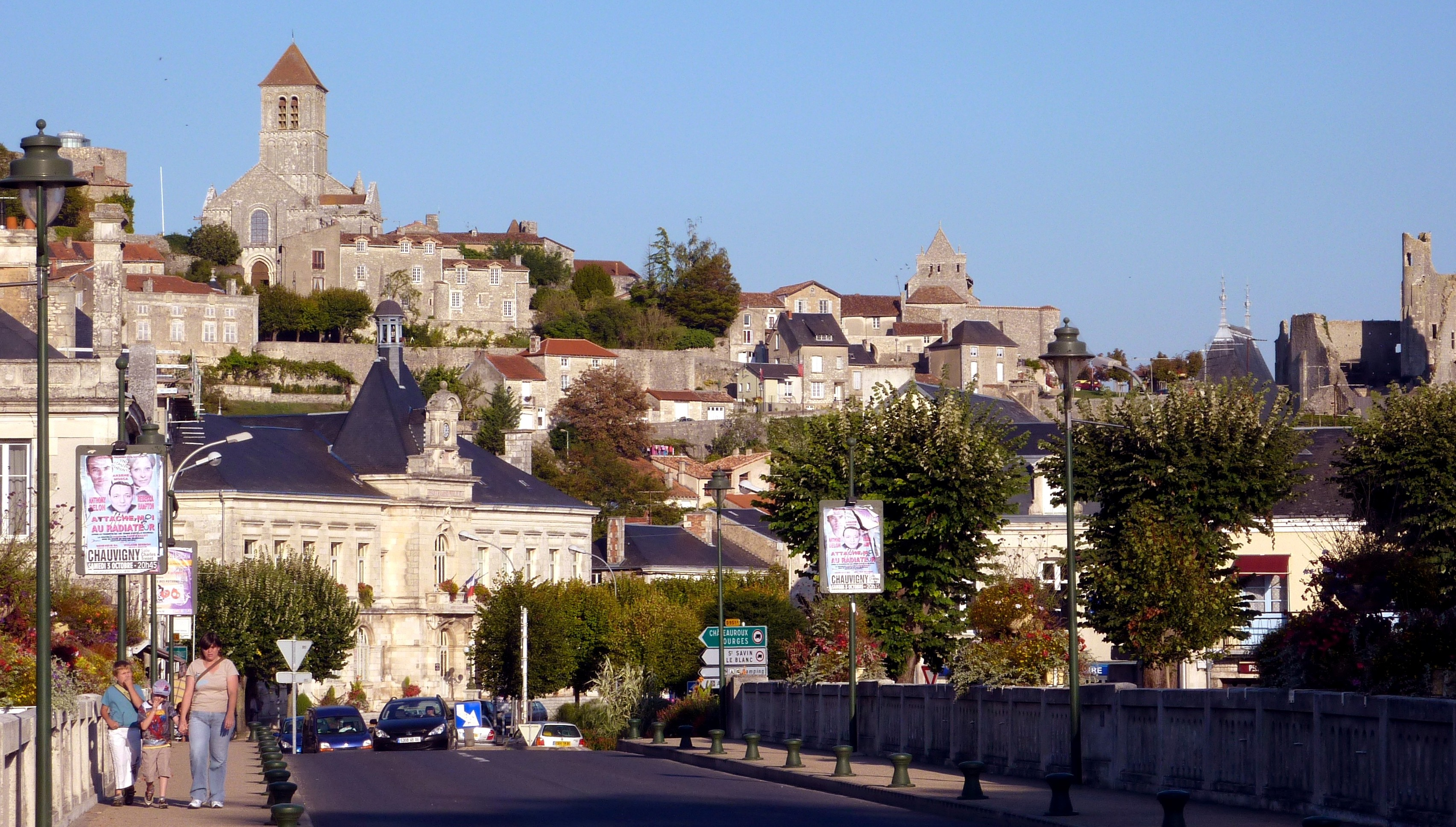 Vue sur Chauvigny depuis le pont sur la Vienne